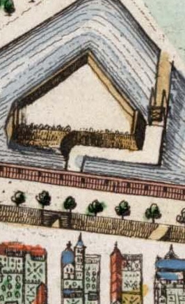 Uitsnede uit een 17e eeuwse kaart (Atlas van Loon, 1649) van de stad Utrecht. Erop staan bolwerk Lepelenburg, huis Lepelenburg, de Maliebrug en Maliepoort, en de verdedigingsgracht (Maliesingel). Noot: het oosten ligt boven in de afbeelding/kaart.